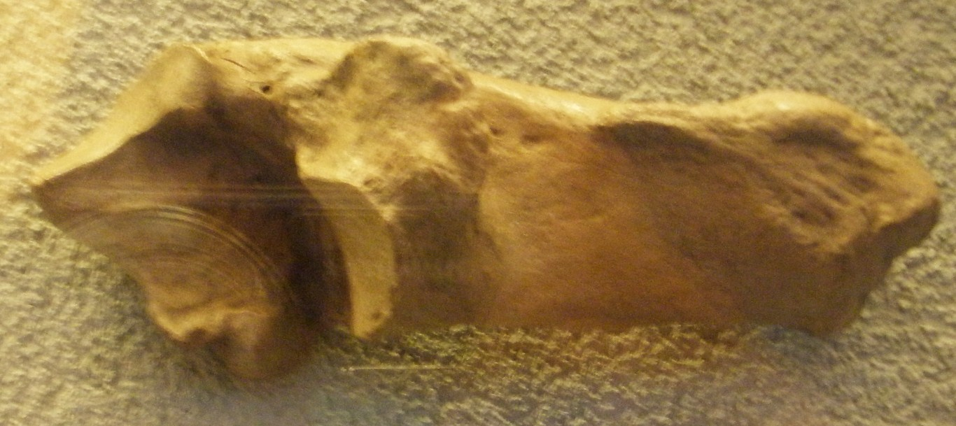 Fossil of Eucladoceros, an extinct deer- Took the photo at Naturalis museum, Leiden